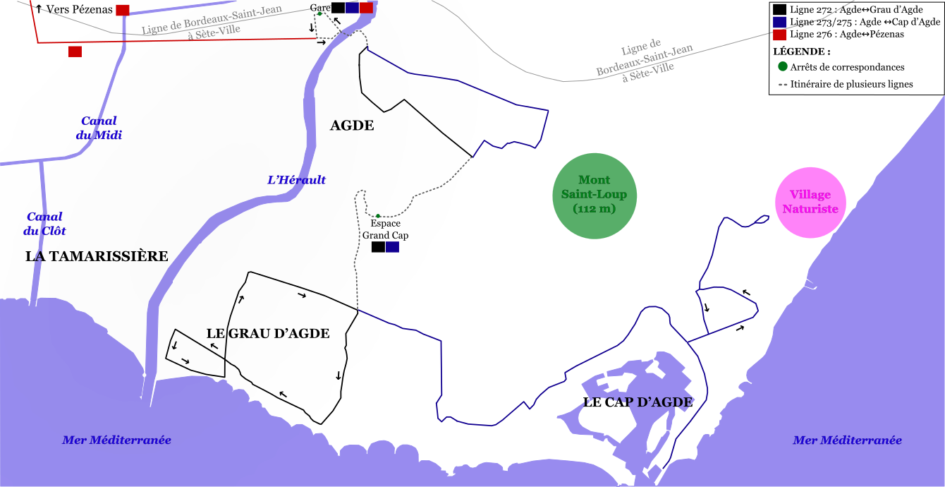 Schéma des lignes régulières du réseau Cap’Bus à Agde en 2006.